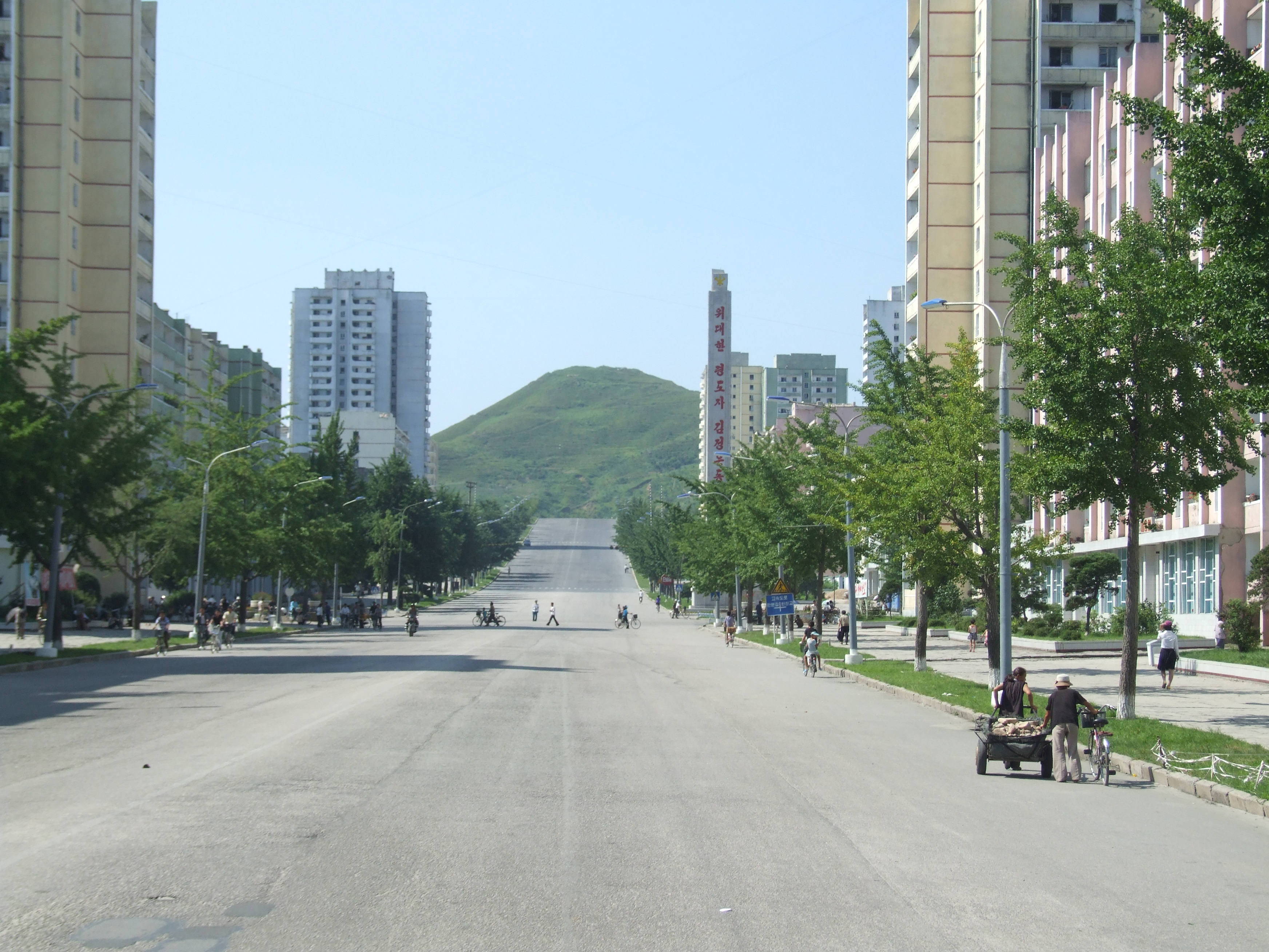 Straße in Kaesong